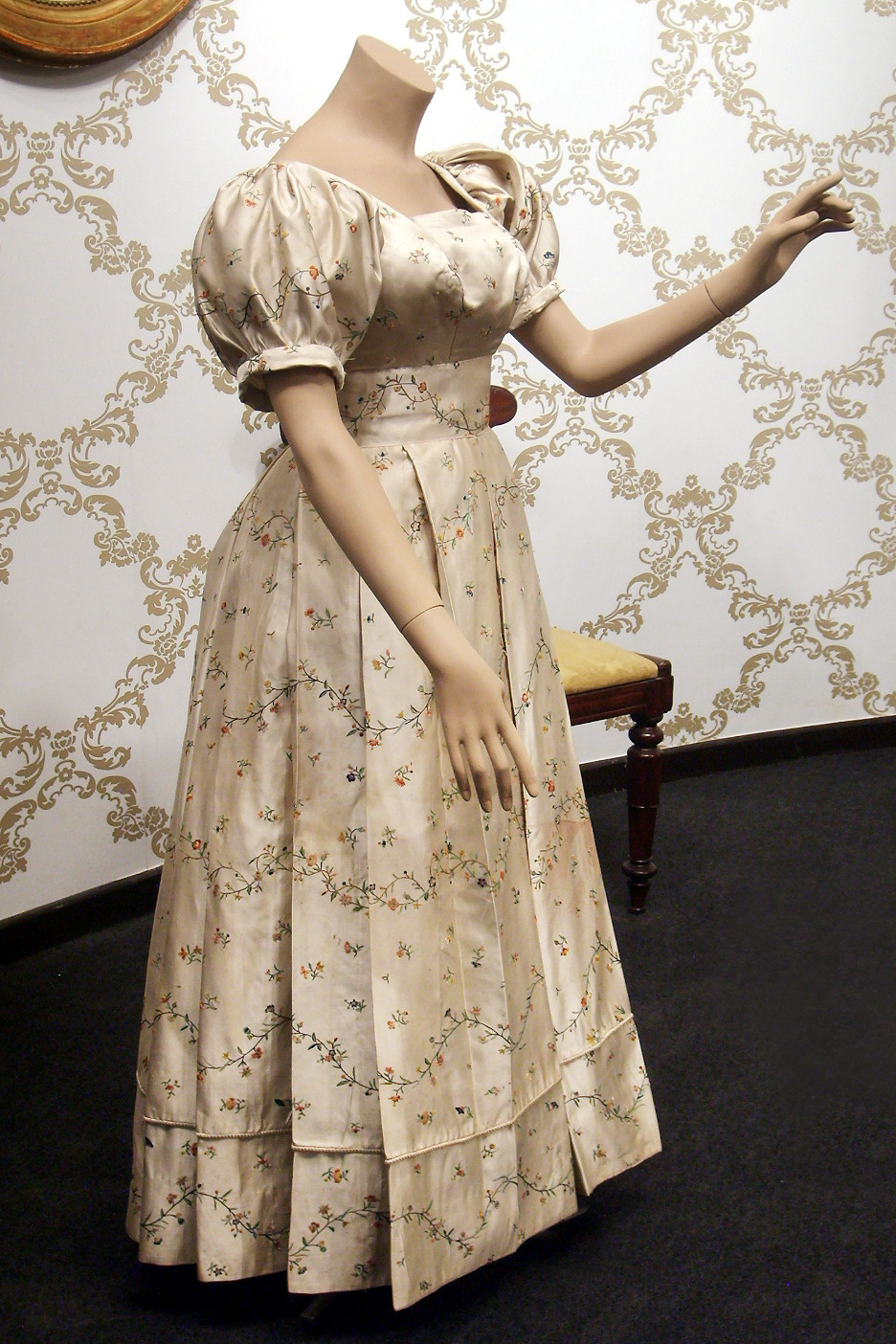 Traje de seda color crema de Doña Javiera Carrera. Museo del Carmen de Maipú, Santiago de Chile.